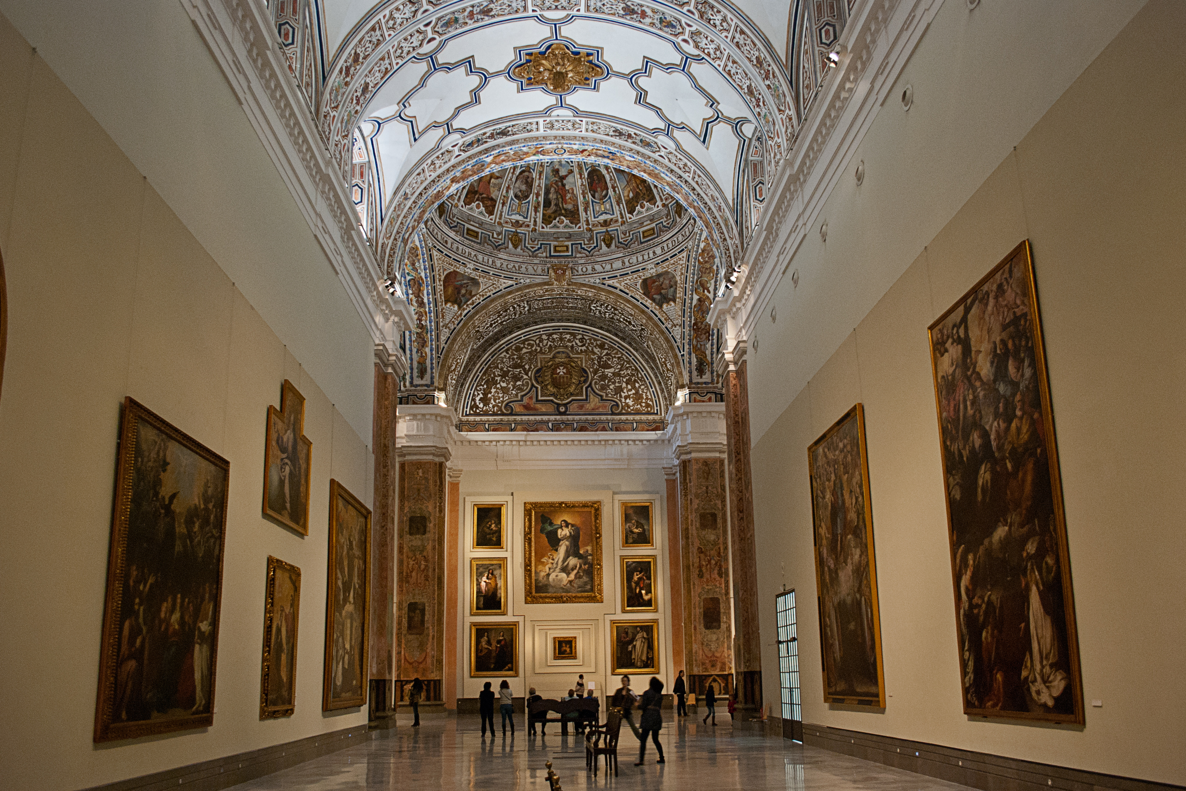 Sala V del Museo de Bellas Artes de Sevilla, que ocupa la antigua iglesia del Convento de la Merced.